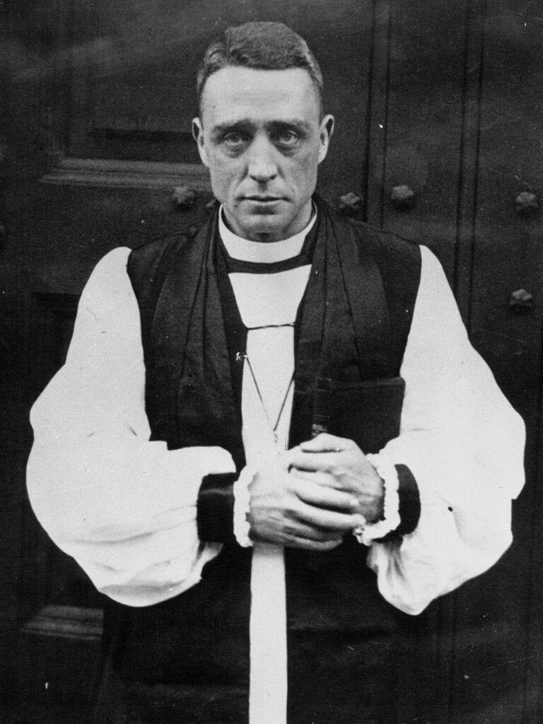 Titre : Révérend R.O. Hall, consacré évêque de Hong-Kong à l'église Saint Paul de Londres : [photographie de presse] / Planet Auteur : Planet News (Agence de presse). Agence photographique Éditeur : diff. par l'Agence Mondial (Paris) Date d'édition : 1932 Type : image fixe Type : photographie Langue : Français Format : 1 photogr. nég. sur verre ; 13 x 18 cm (sup.) ou moins Format : image/jpeg Description : Ancien détenteur : Agence de presse Mondial Photo-Presse Description : Référence bibliographique : Mondial, 4826 Description : Appartient à l’ensemble documentaire : Pho20MPP Droits : domaine public Identifiant : ark:/12148/btv1b90369782 Source : Bibliothèque nationale de France, département Estampes et photographie, EI-13 (2973) Relation : Notice de recueil : Relation : Appartient à : [Recueil. Actualités 1932-09**1932-11. Agence Mondial MON 4029-5045] Relation